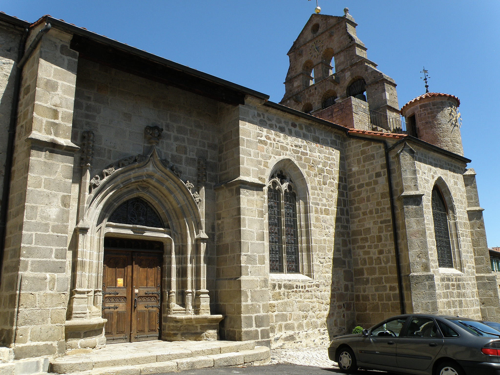 Beauzac, dép. de la Haute-Loire, France (Auvergne). Église, flanc méridional, avec portail de style gothique flamboyant.